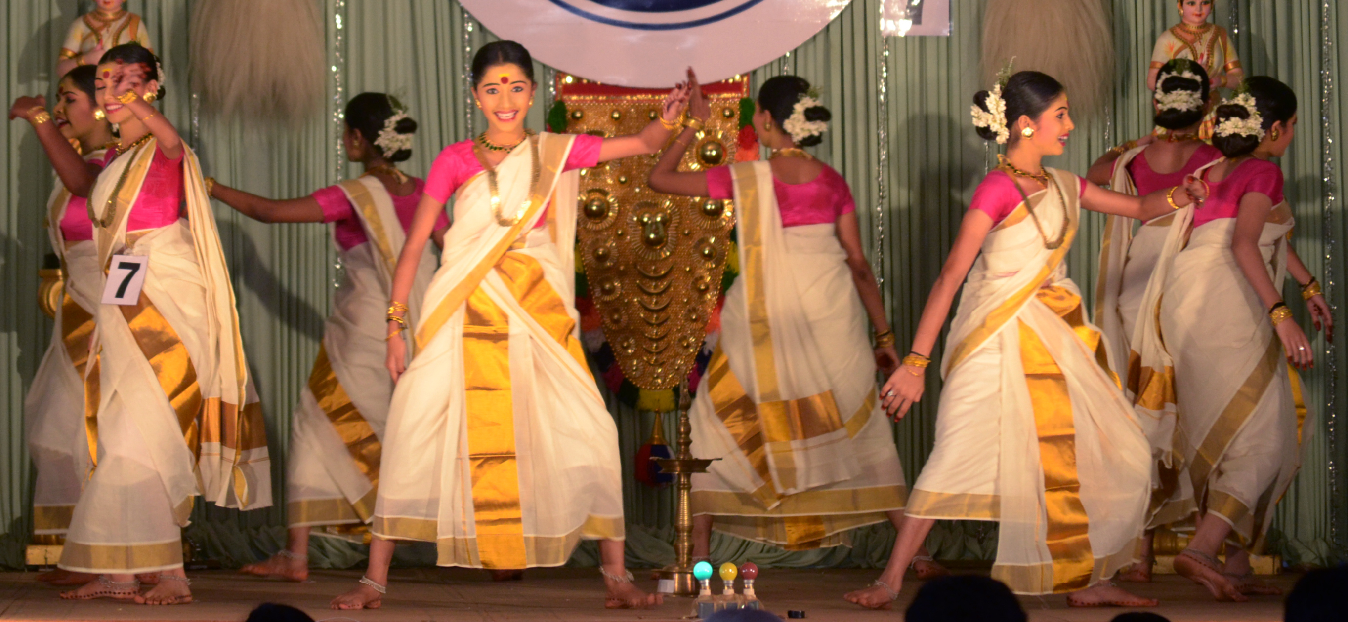 തിരുവാതിര കളിയിൽ നിന്നും ഒരു രംഗം. സ്കൂള്‍ കലോത്സവം 2012, തൃശ്ശൂര്‍